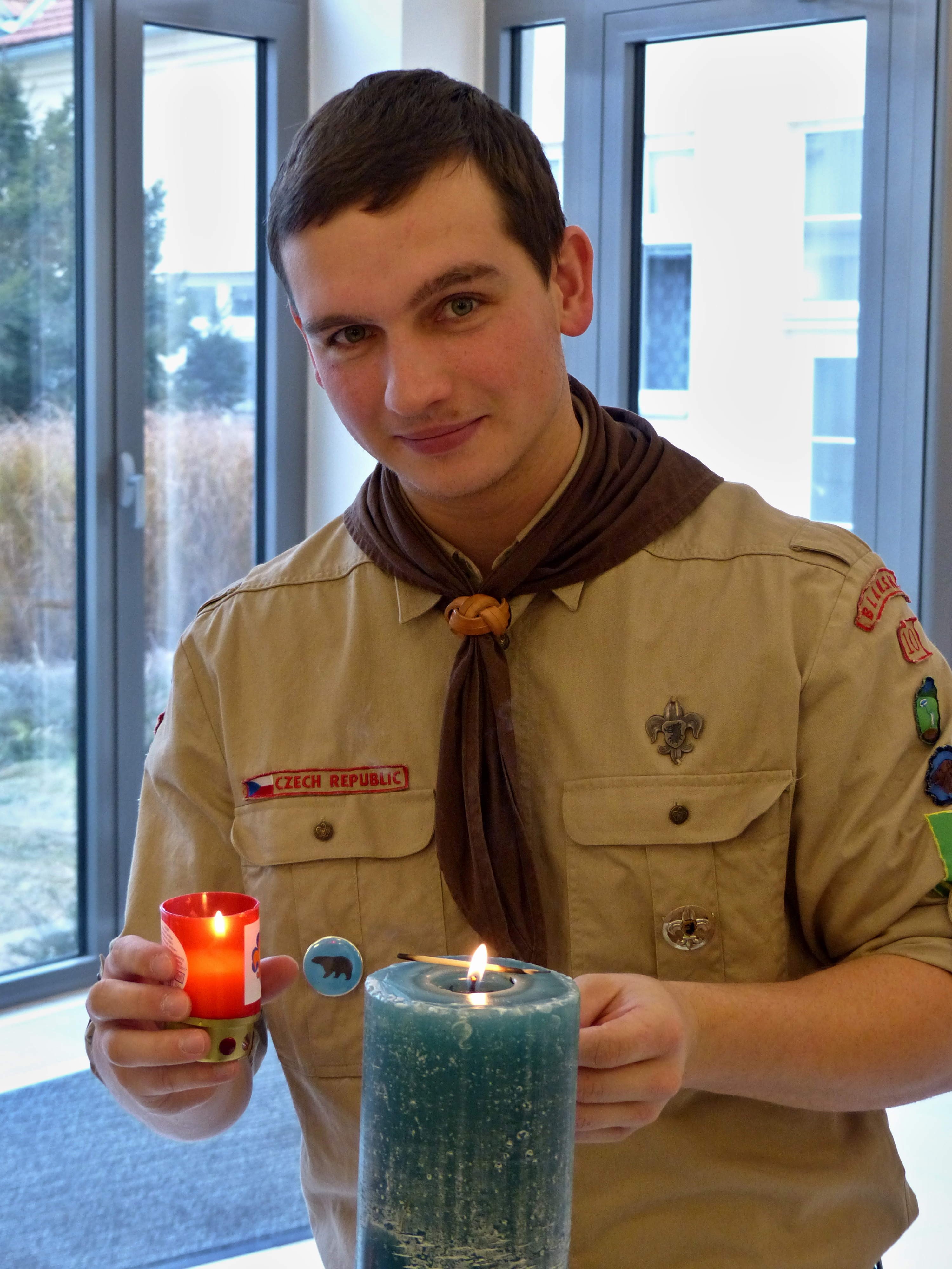 Před Vánocemi skauti rozdávají světlo dovezené z Betléma - snímek pořízen v Blansku, kde je rozdávání světla kulturní událostí spojenou s odpoledními a večerními koncerty místních spolků a sdružení.